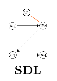 SDL frame